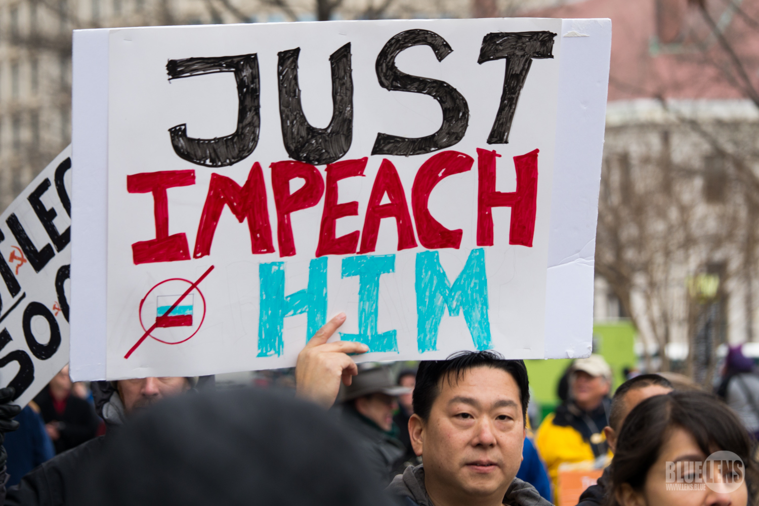 Trump-Inauguration2017-1050707